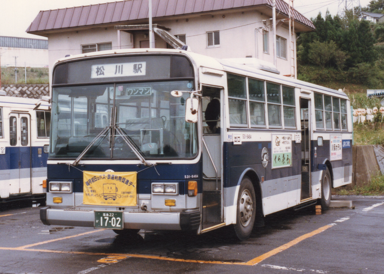 川俣線 川俣支店にて 福島22か１７０２